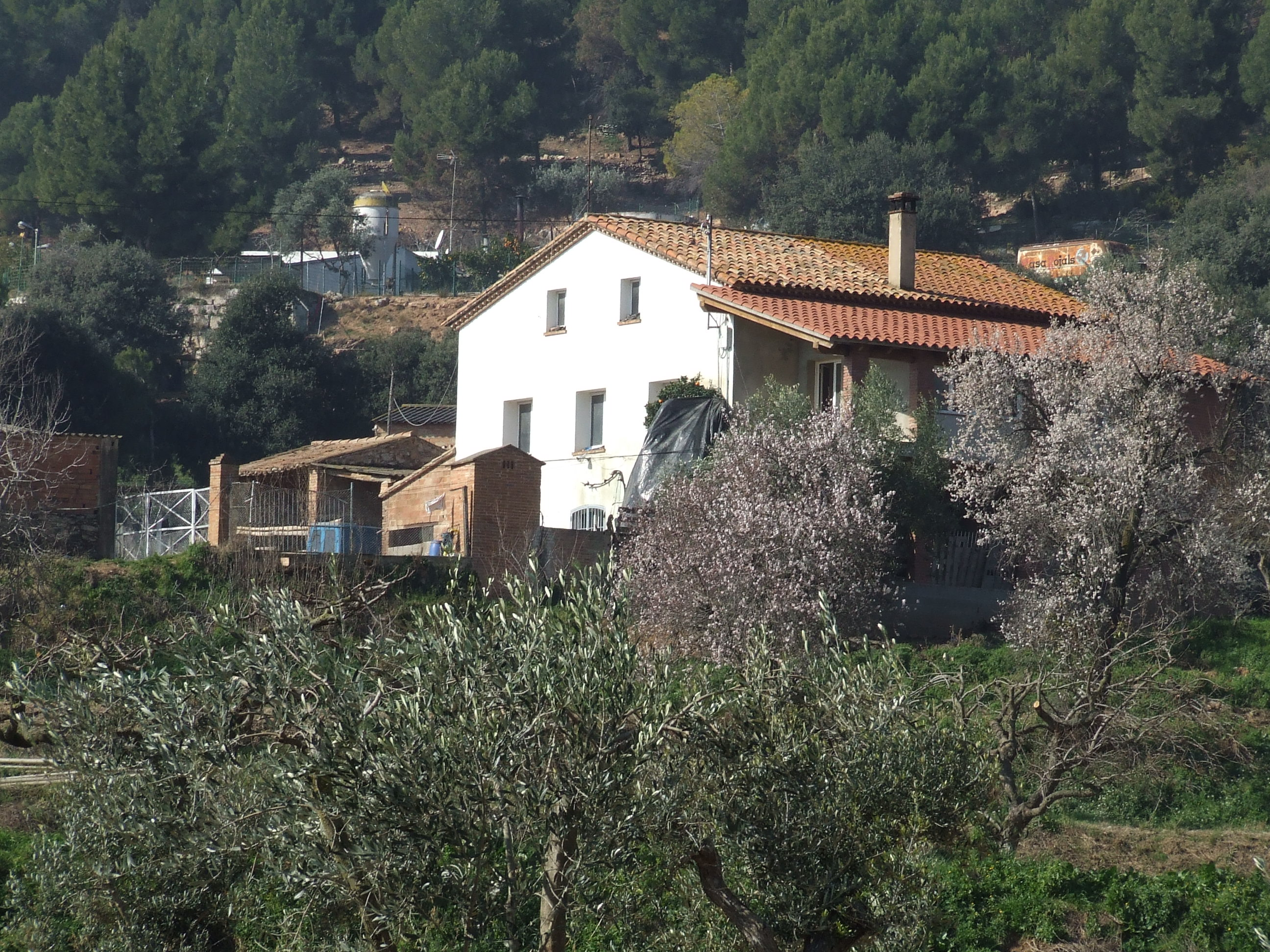 Can Fes (Bigues, Bigues i Riells, Vallès Oriental)